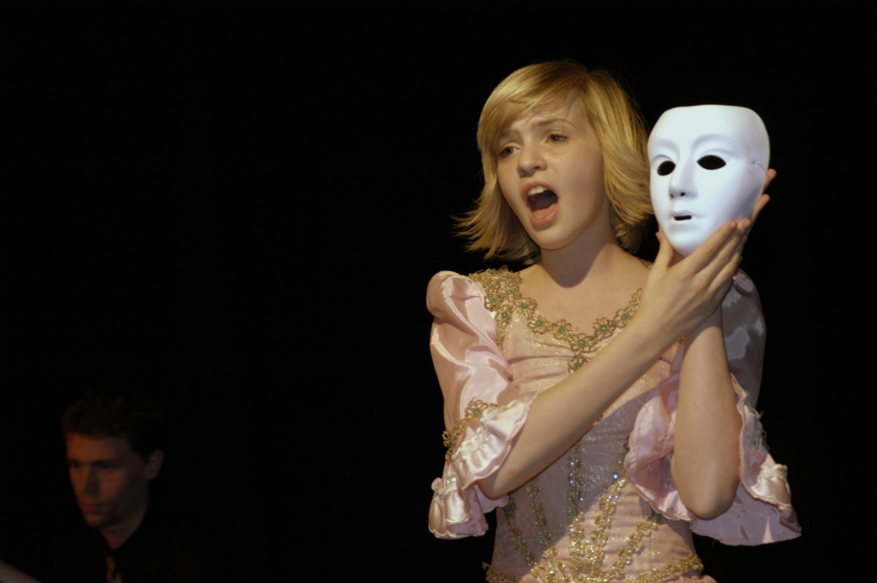 Berliner Kinderoper: "Zirkus Liliput", Oper für Kinder von Johann Adam Hiller und Manuel Rösler.